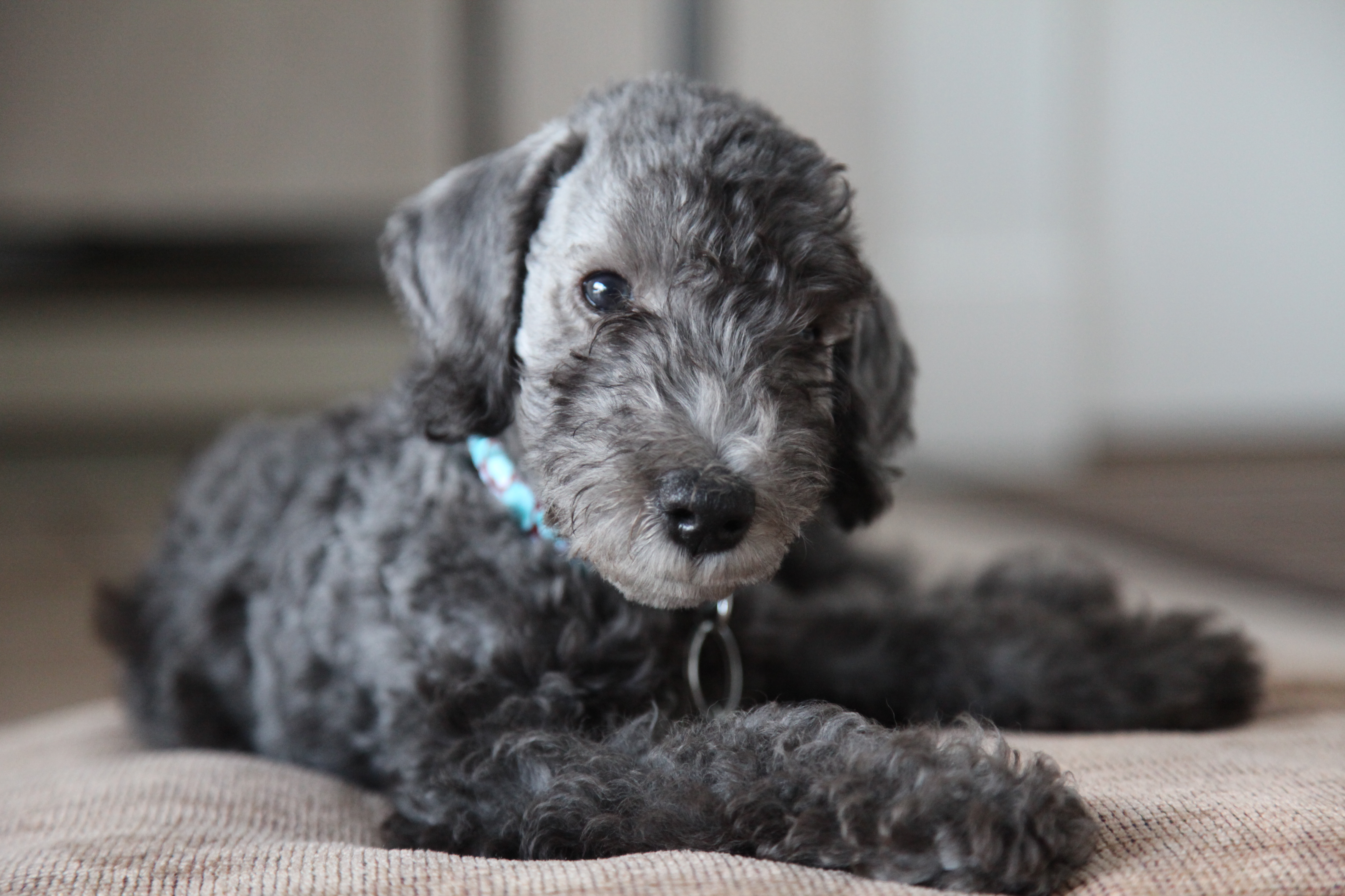 Barkley, 9 Weeks. Bedlington Terrier puppy